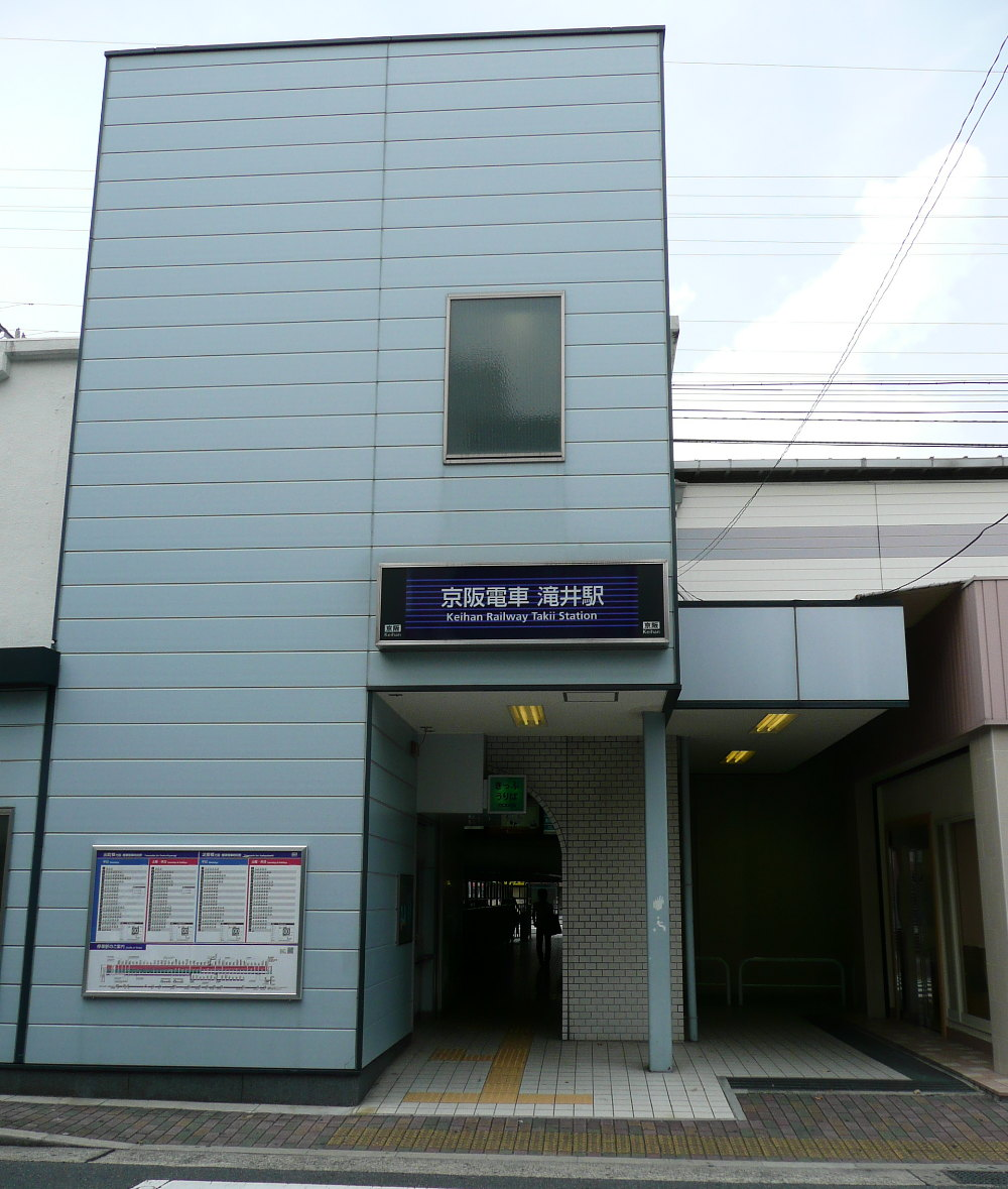 京阪・滝井駅東口